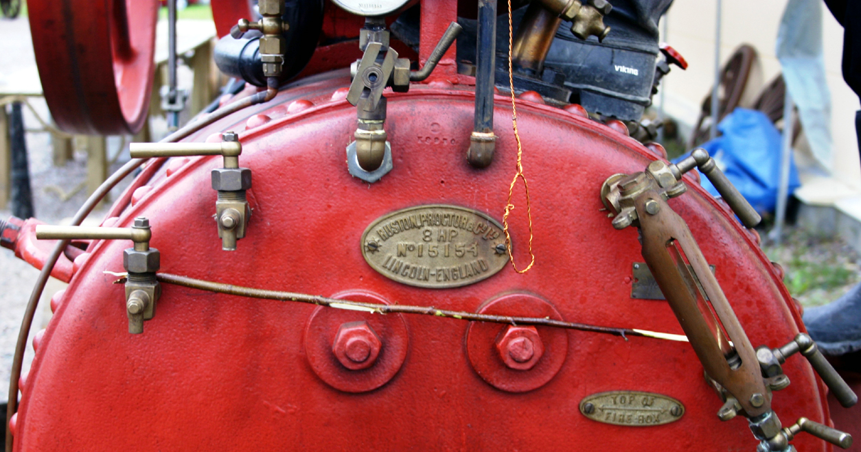 paikallishöyrykoneen vesilasi ja koestinhanat